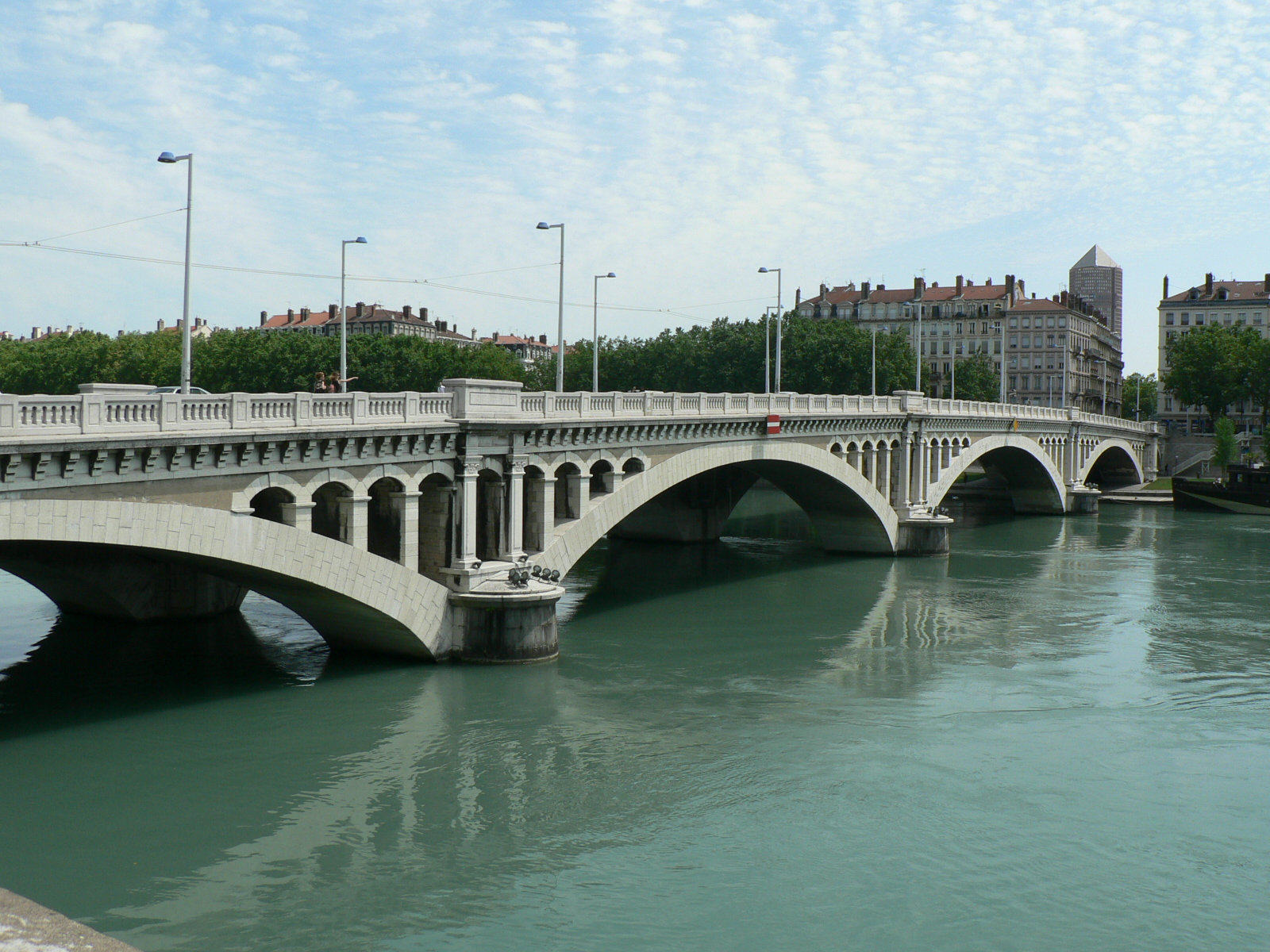 Ponts de Lyon – Pont Wilson